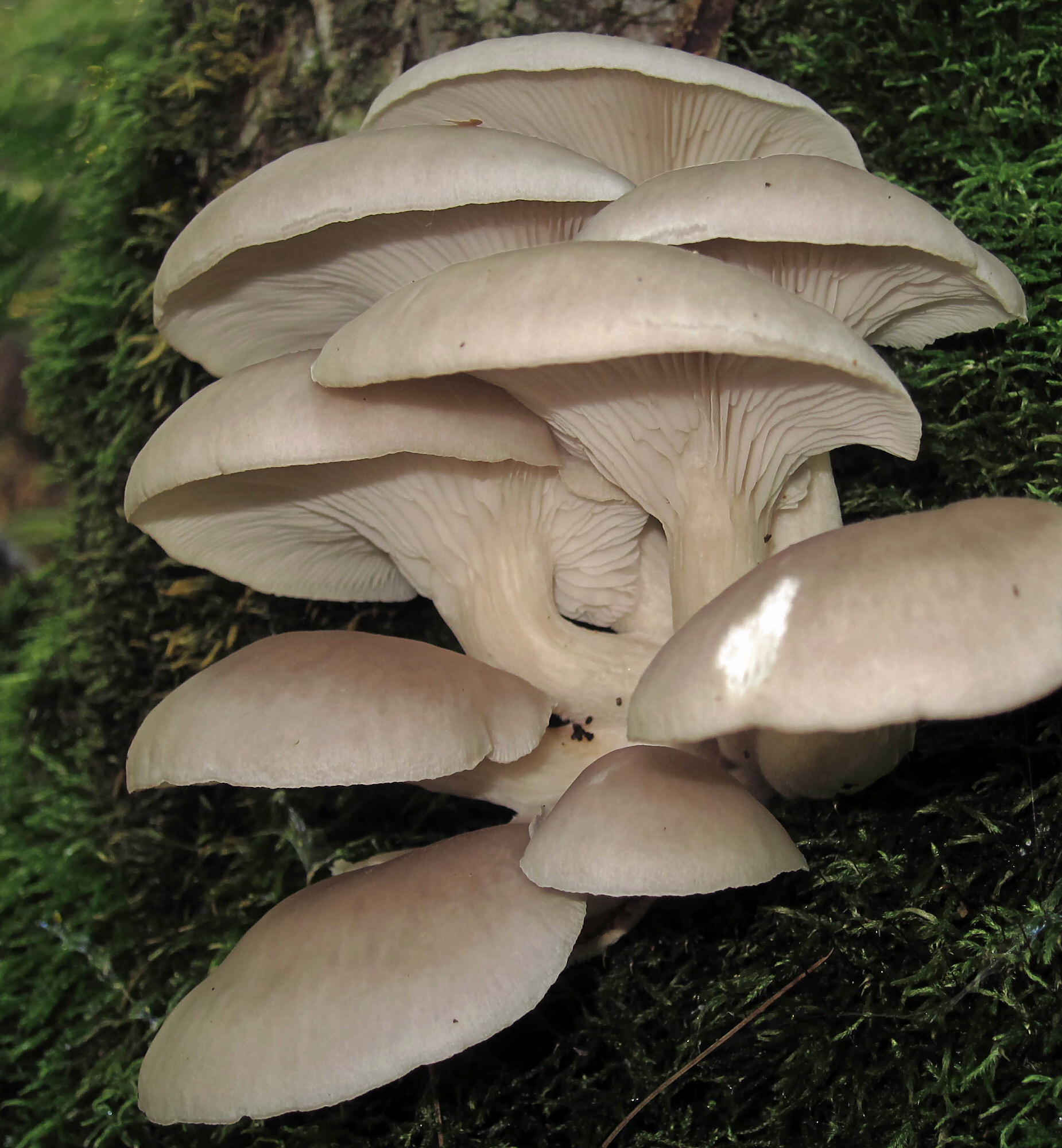 poussent sur un arbre mort debout wikipedia Le pleurote en huitre pousse de l'automne à l'hiver selon les régions, en touffes sur les feuillus vivants ou tombés. C'est un parasite de blessure mais il est également saprophyte. Comestibilité[modifier] C'est un comestible honorable, si l'on n'est pas rebuté par la flaccidité de sa chair. Contrairement aux cèpes ou au girolles, il ne se suffit pas vraiment à lui-même simplement poêlé, il bénéficiera largement d'être cuisiné de manière plus élaborée, en mélange ou en accompagnement.